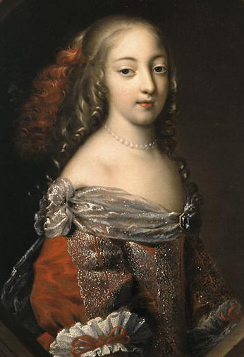 Porträt der jungen Françoise Athénaïs de Rochechouart de Mortemart vor ihrer Hochzeit mit Louis-Henri Pardaillan de Gondrin, marquis de Montespan.